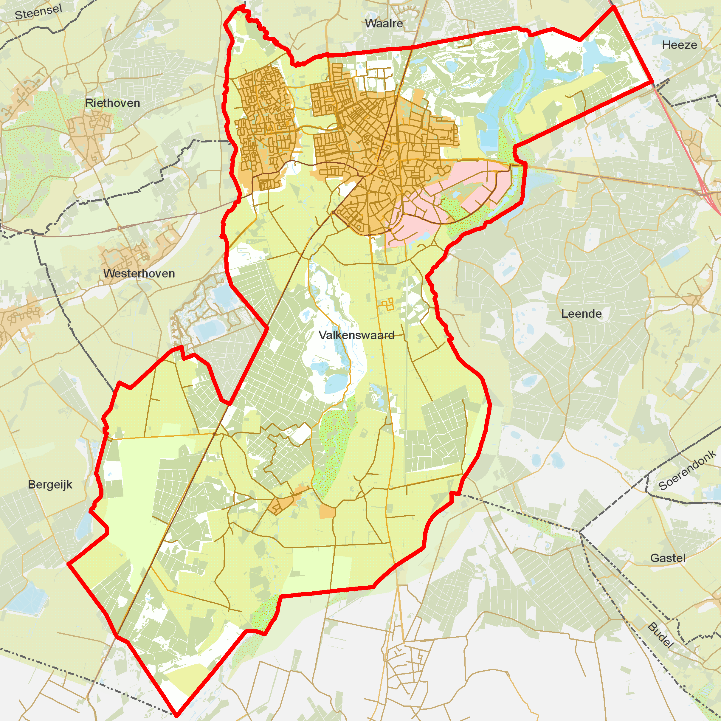 BAG woonplaatsen - Gemeente Valkenswaard.png